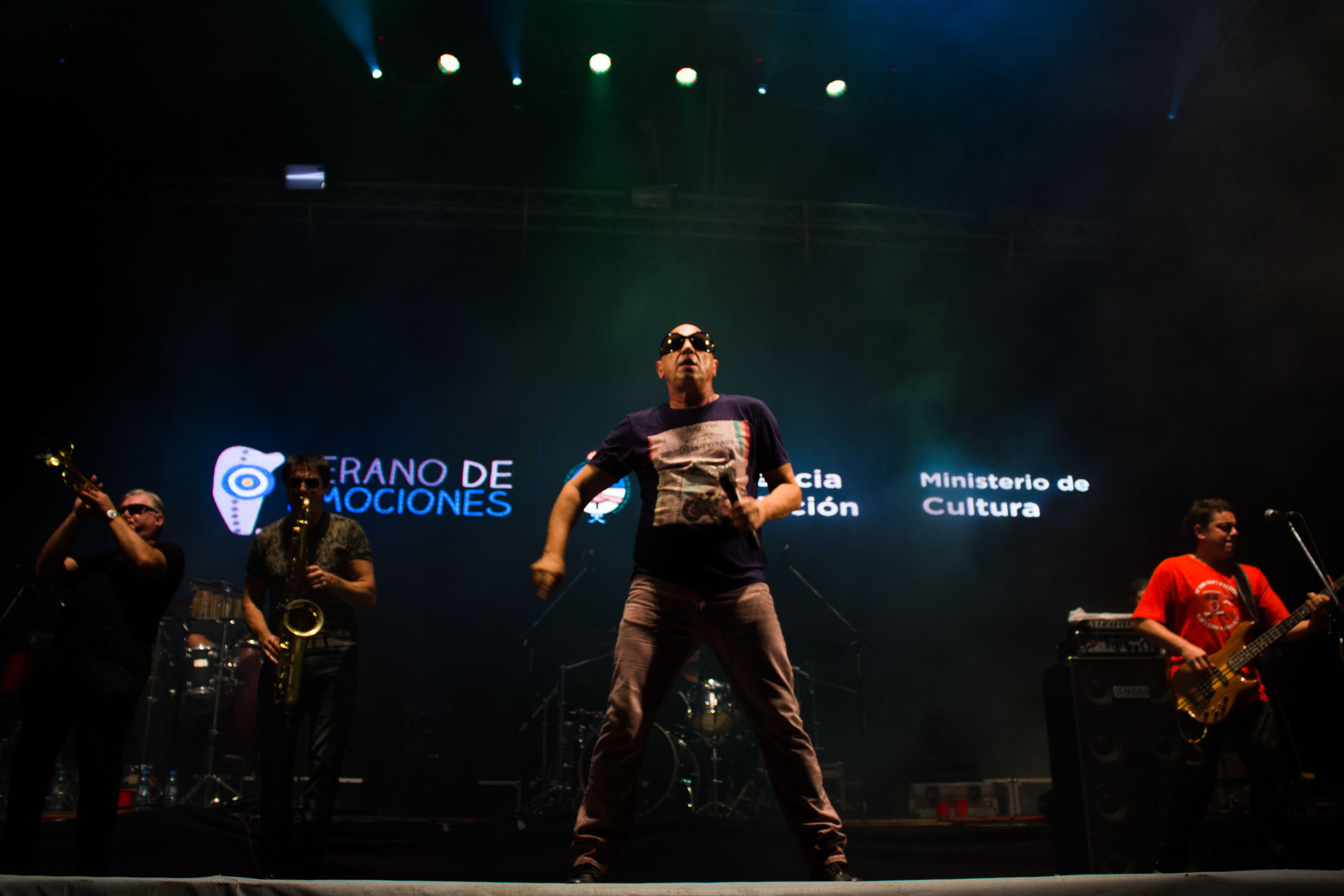 Las Grutas, 19 de febrero de 2015 En el marco de la campaña "Verano de emociones", organizada por Presidencia de la Nación en conjunto con el Ministerio de Cultura de la Nación se presentaron Cuentíficos del Palo, Cumbia Hasta el Lunes y la Mosca.